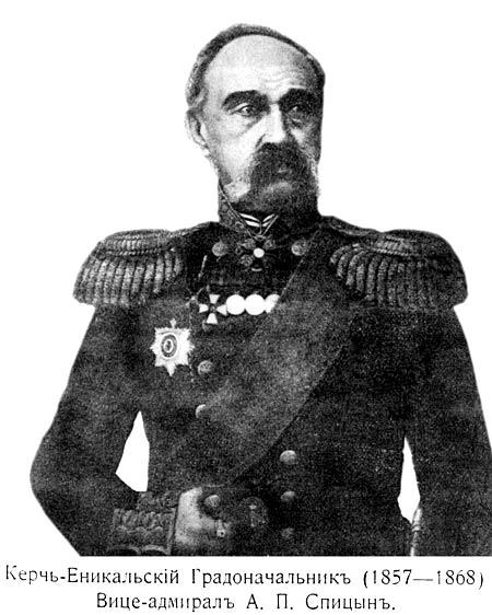 Александр Петрович Спицын (1810—1888) — русский военно-морской деятель, адмирал